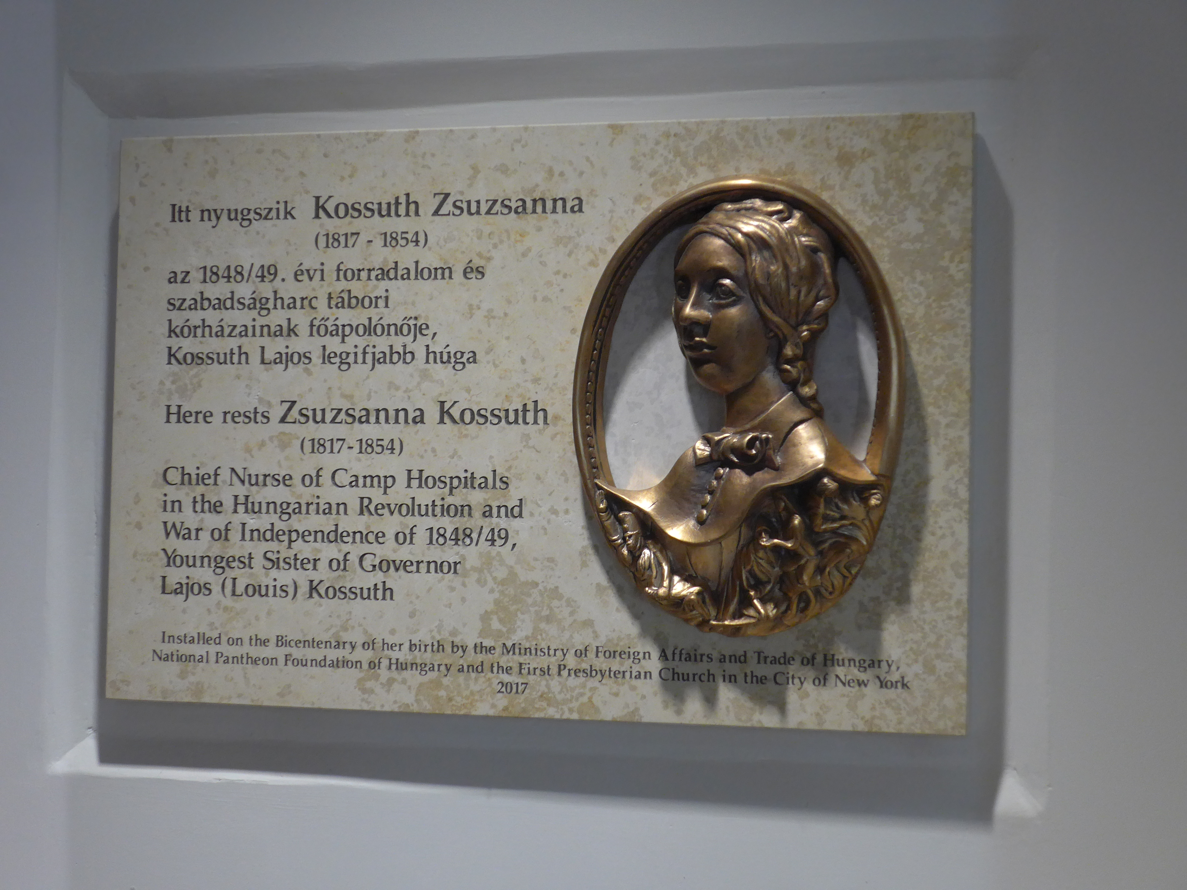 Kossuth Zsuzsanna sírhelyét jelölő emléktábla, melyen Varga Tamás domborműve látható, 2018-ban avatták New York-ban, a First Presbyterian Church épületének bejáratánál.